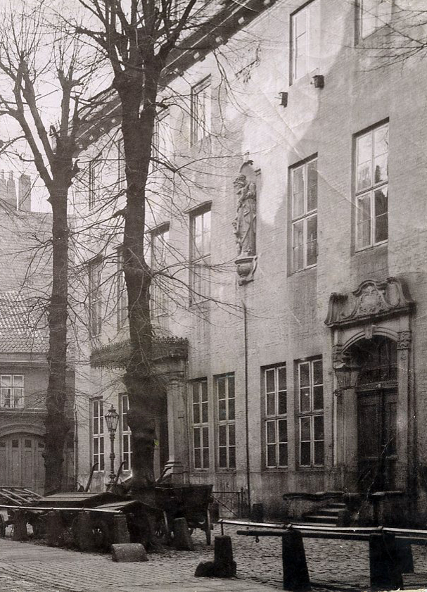 Alter Wandrahm № 20 und 21, Mortzenhaus, Aufnahme vor 1885 (Niederlegung der Häuser zwischen Kehrwieder und Alter Wandrahm)